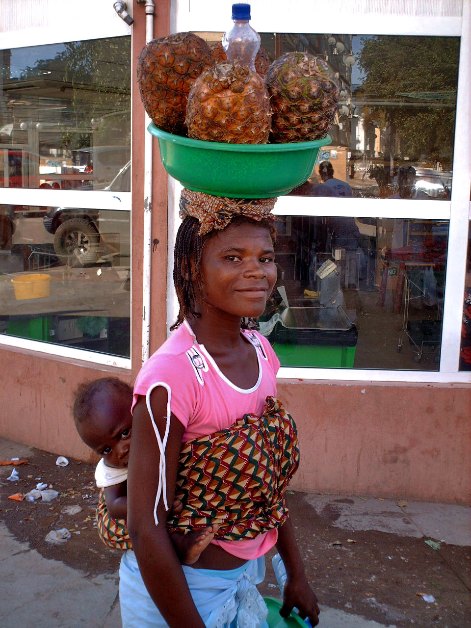 A imagem de Angola, a mãe trabalhando para tentar garantir o sustento do filho, carregado nas costas. Imagem comum em Angola.